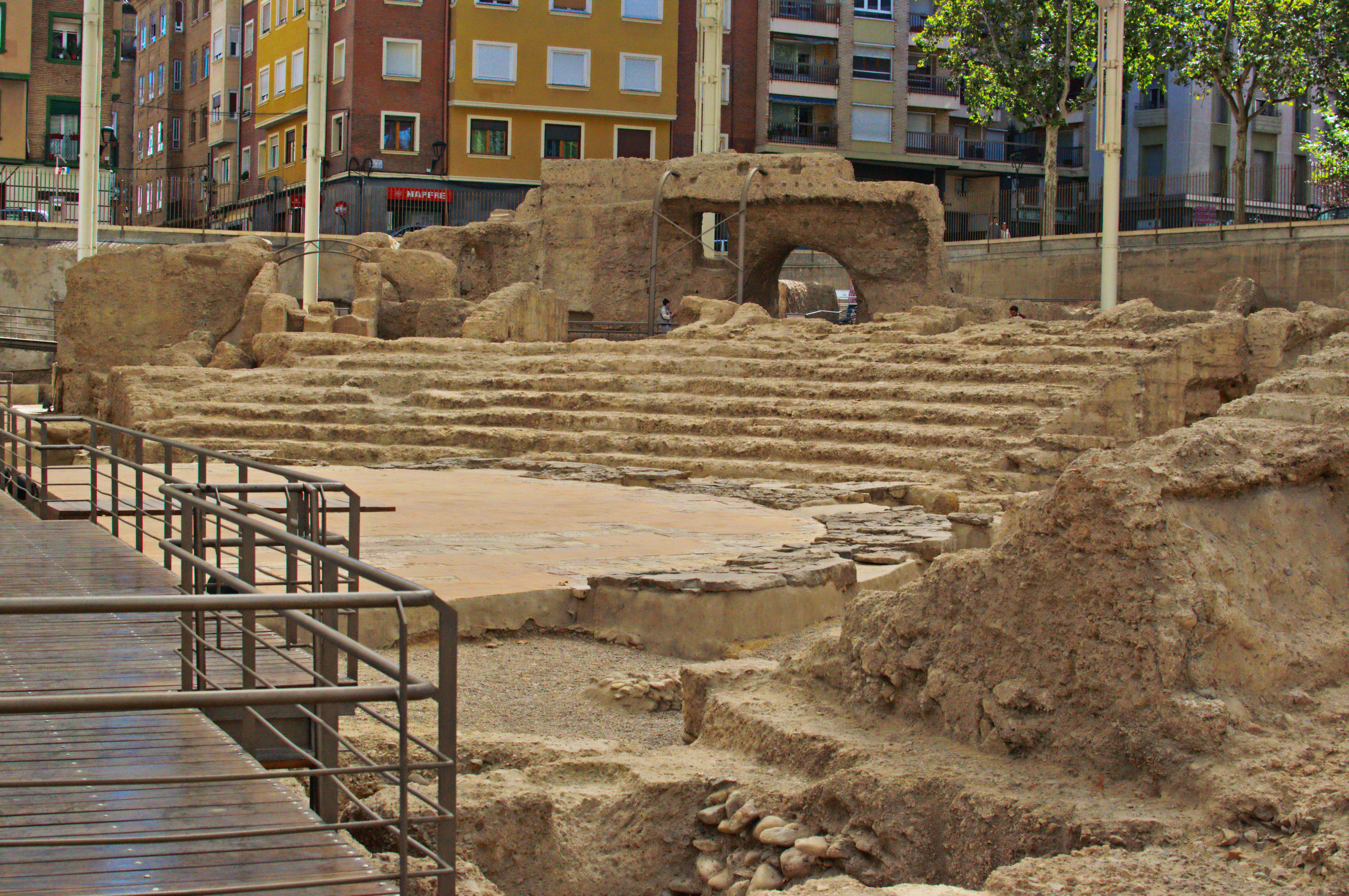 Teatro romano de Caesaraugusta (Zaragoza).